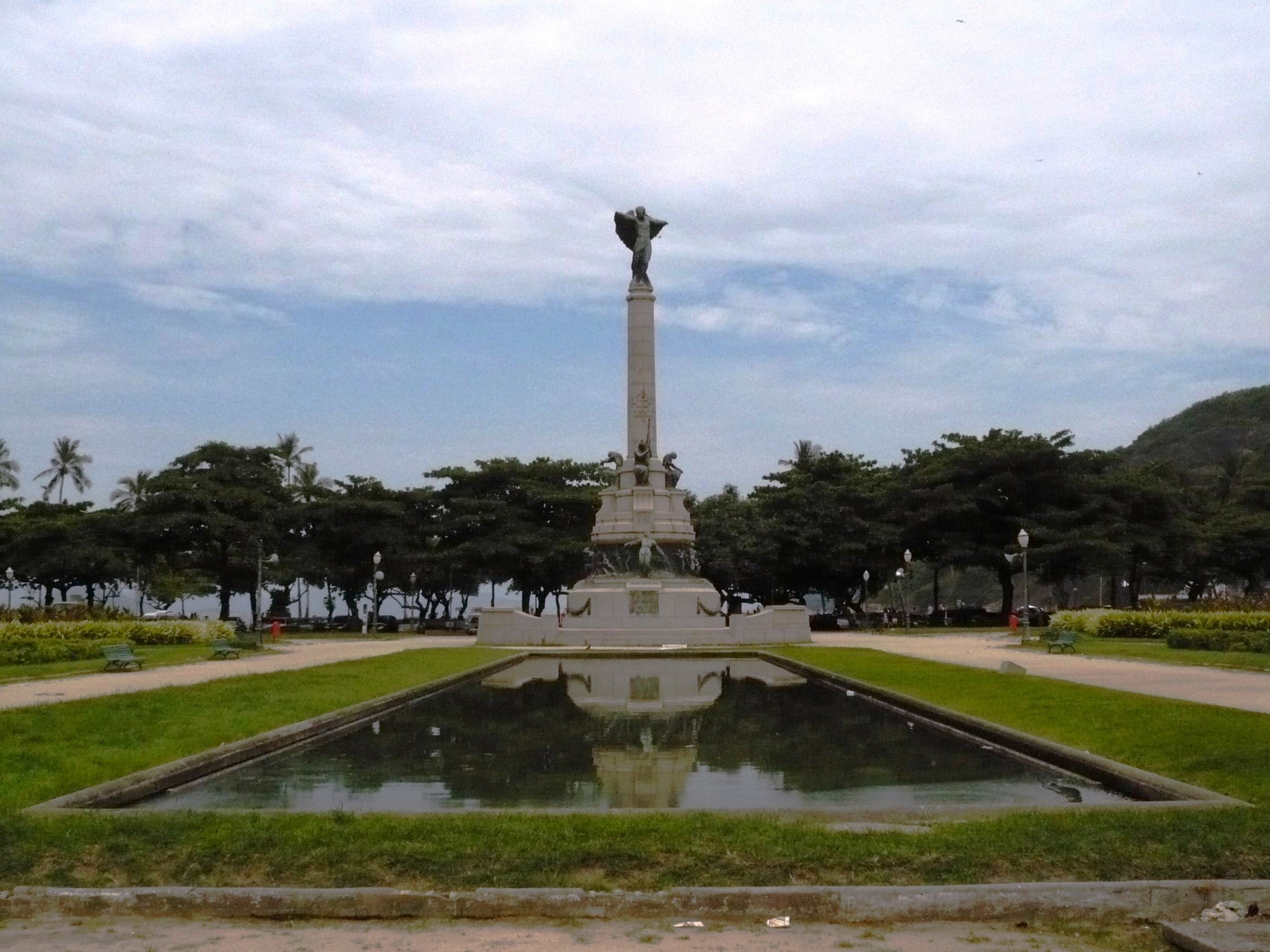 Monumento aos Heróis de Laguna e Dourados, Urca, Rio de Janeiro, RJ, Brasil.